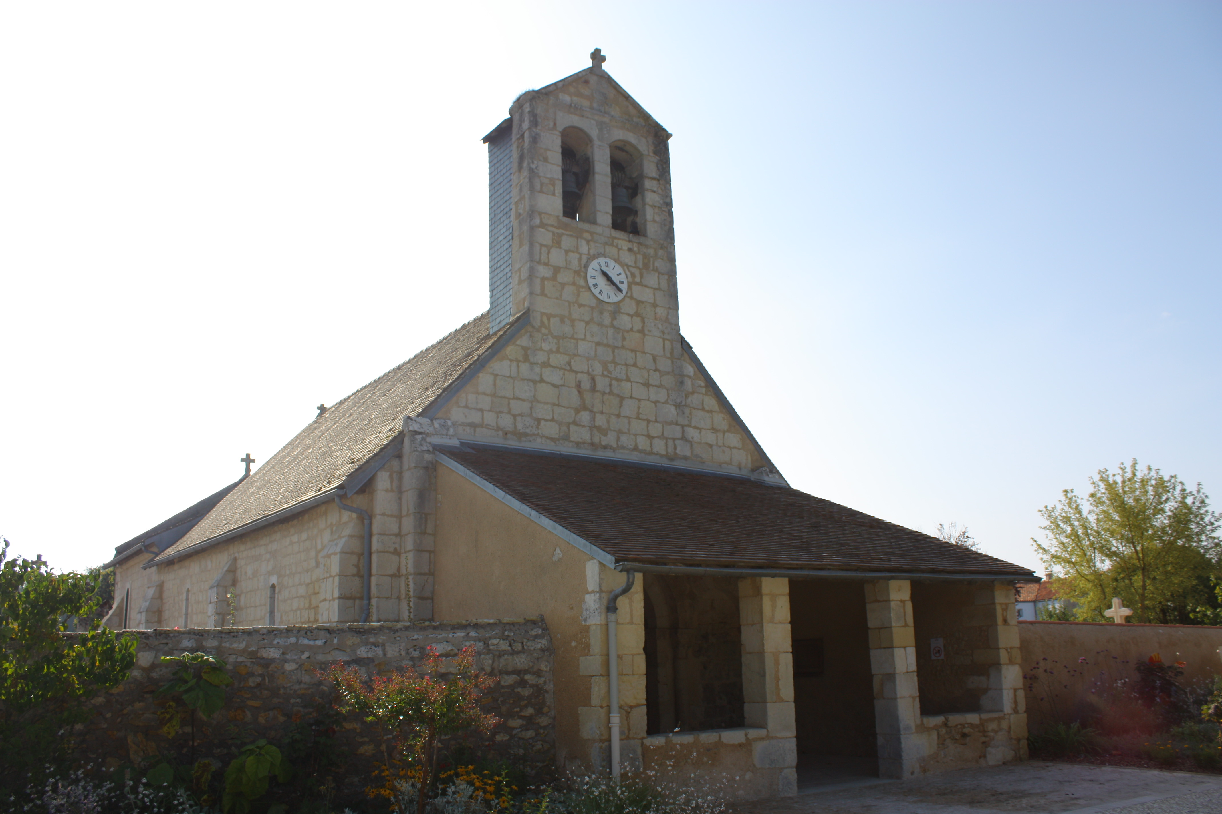 Église Saint-Nicolas de Sèvres-Anxaumont .